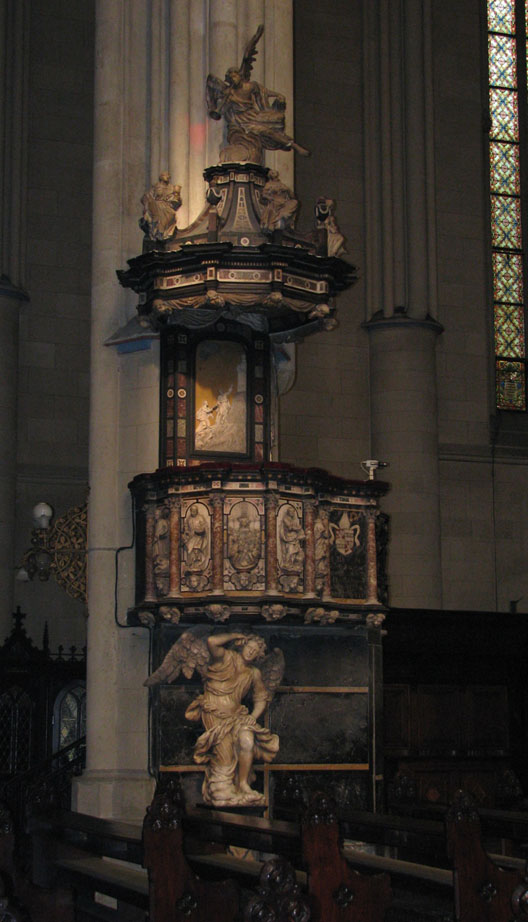 Barokna propovijedaonica u Zagrebačkoj katedrali